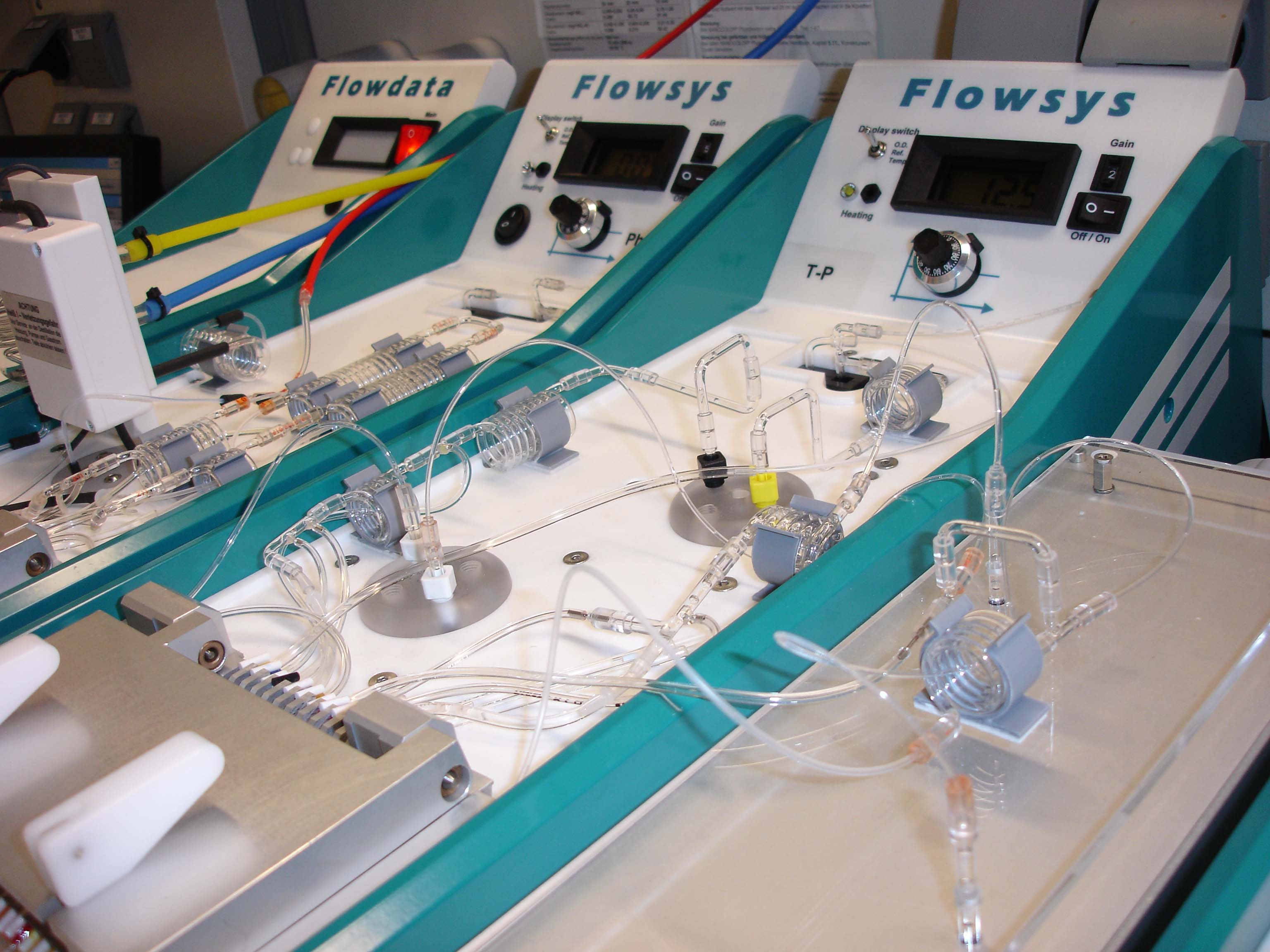 CFA-Analysator Manifold-Gesamtphosphor